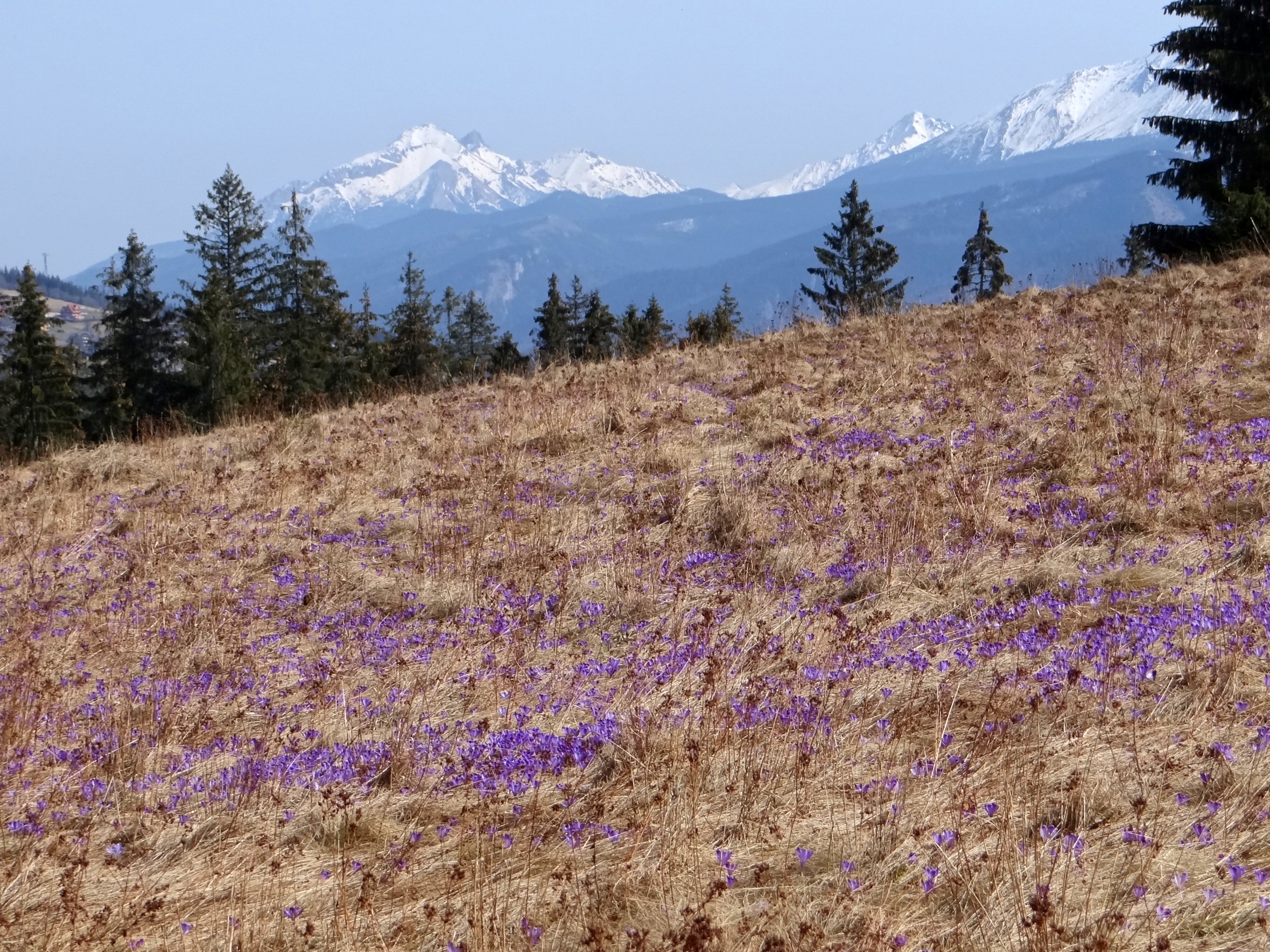 Polana i osiedle Urchoci Wierch na Przysłopie Witowskim